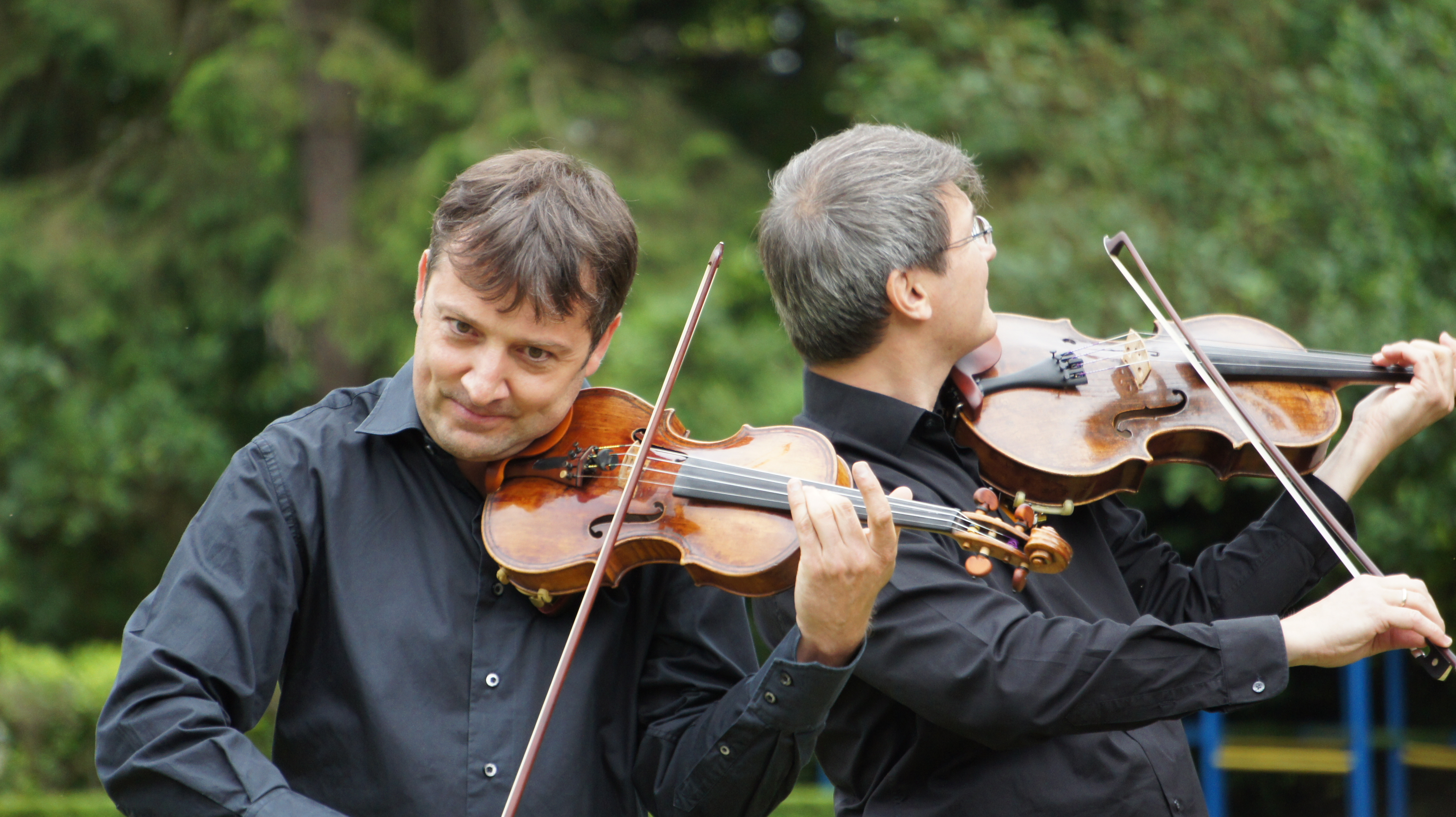 Le quaturo en concert au château de st-Brice .